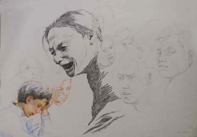 Vietnamesin und Lernende, 1972, cm. 50 x 70, Bleistift, Buntstift, Bez. u.r. „Timner 72“